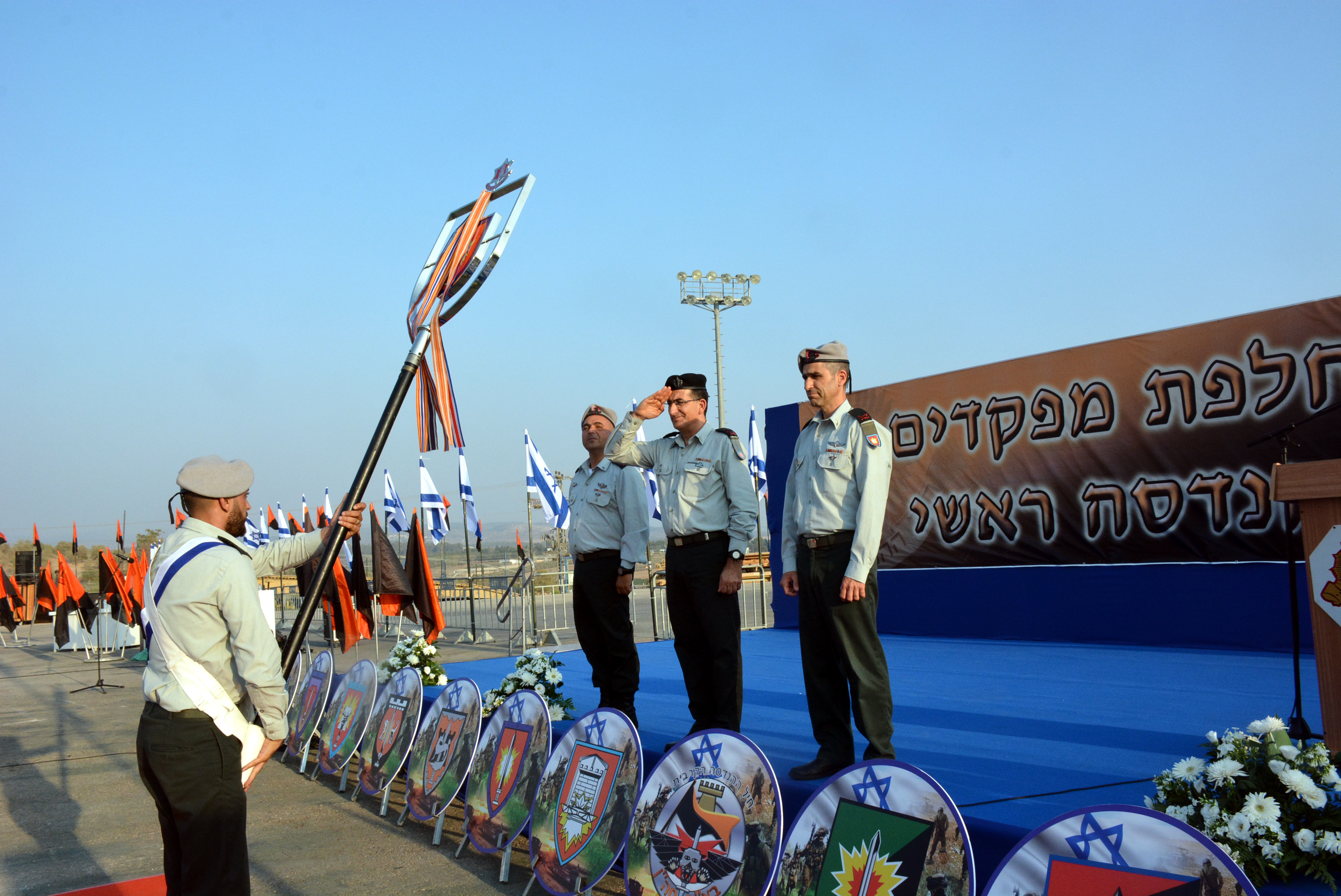 טקס החלפת קהנ"ר, תא"ל אושרי לוגסי, הקהנ"ר היוצא, אלוף קובי ברק מפקד זרוע היבשה, תא"ל אילן סבג הקהנ"ר הנכנס, בטקס שהתקיים ב-17/7/2017